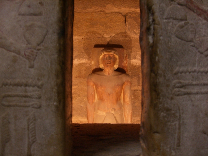 Serdab du mastaba de Ti avec la statue du défunt - Saqqarah ; Ve dynastie égyptienne